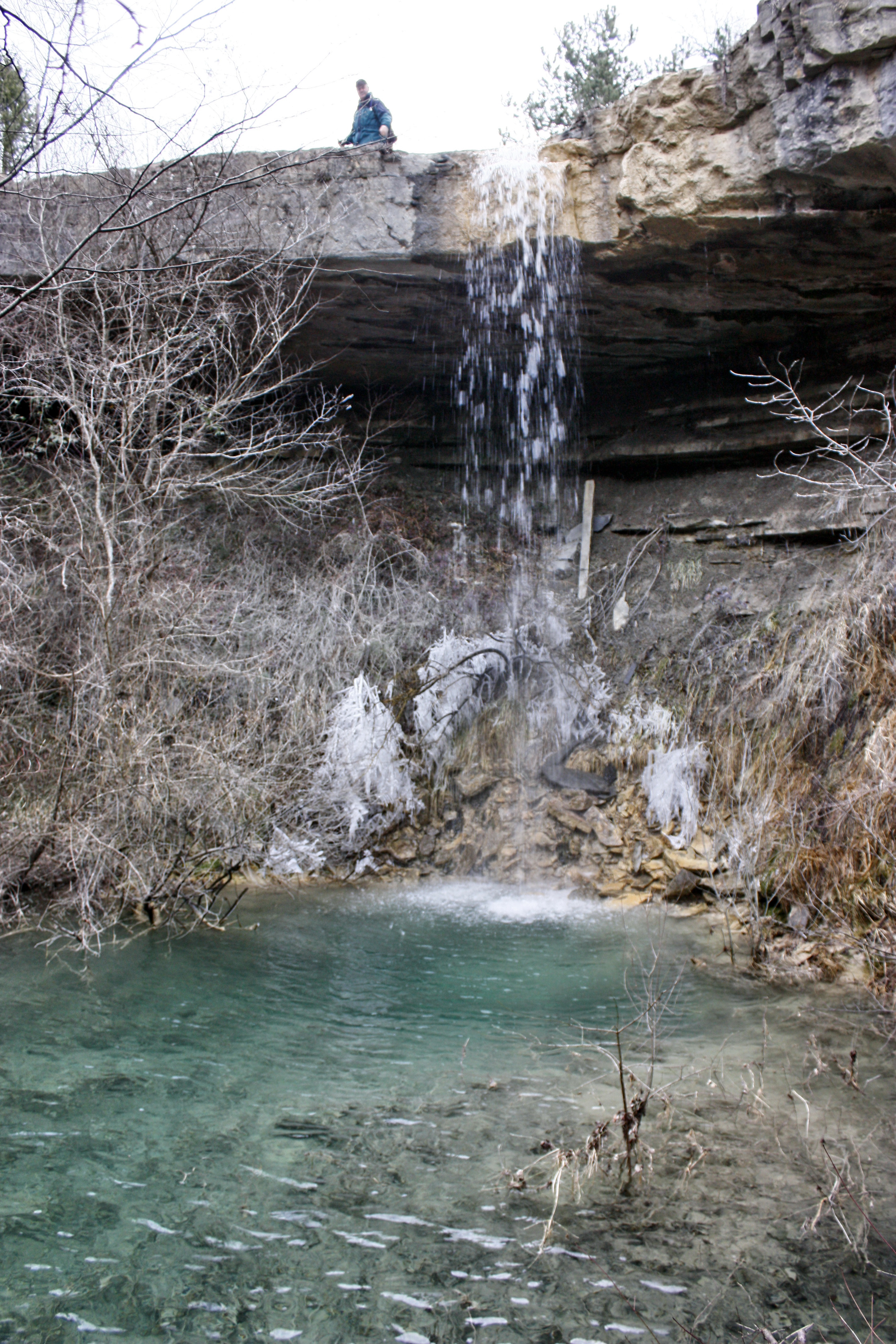 Slap Supot pod Koštabono.